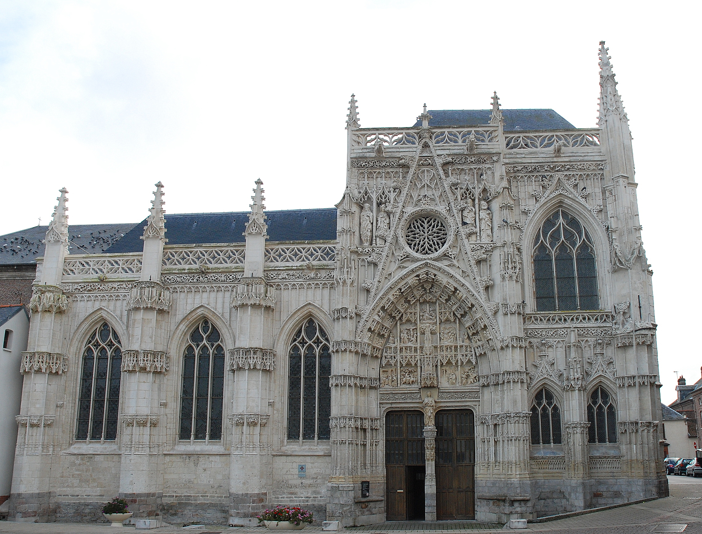 De kapel van de Heilige Geest van Rue, Picardië, Frankrijk